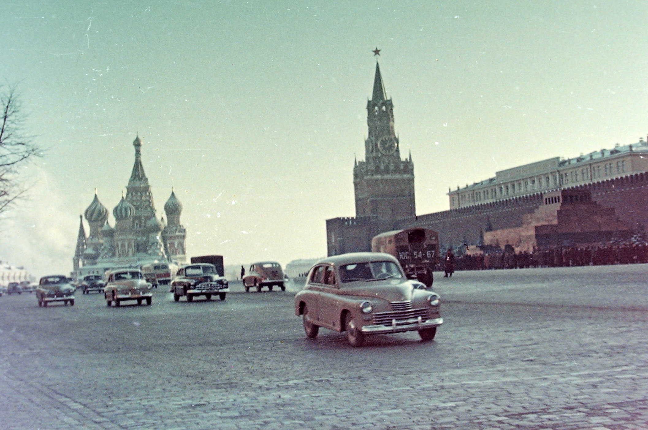 Vörös tér, háttérben a Vaszilij Blazsennij székesegyház, szemben a Szpasszkaja-torony, egykor a Kreml főbejárata, jobbra a Lenin mauzóleum. Location: Russia, Moscow Tags: Soviet Union, colorful, automobile, GAZ-brand, M20 Pobieda, Soviet brand, commercial vehicle, Red Star, mausoleum Title: Vörös tér, háttérben a Vaszilij Blazsennij székesegyház, szemben a Szpasszkaja-torony, egykor a Kreml főbejárata, jobbra a Lenin mauzóleum.